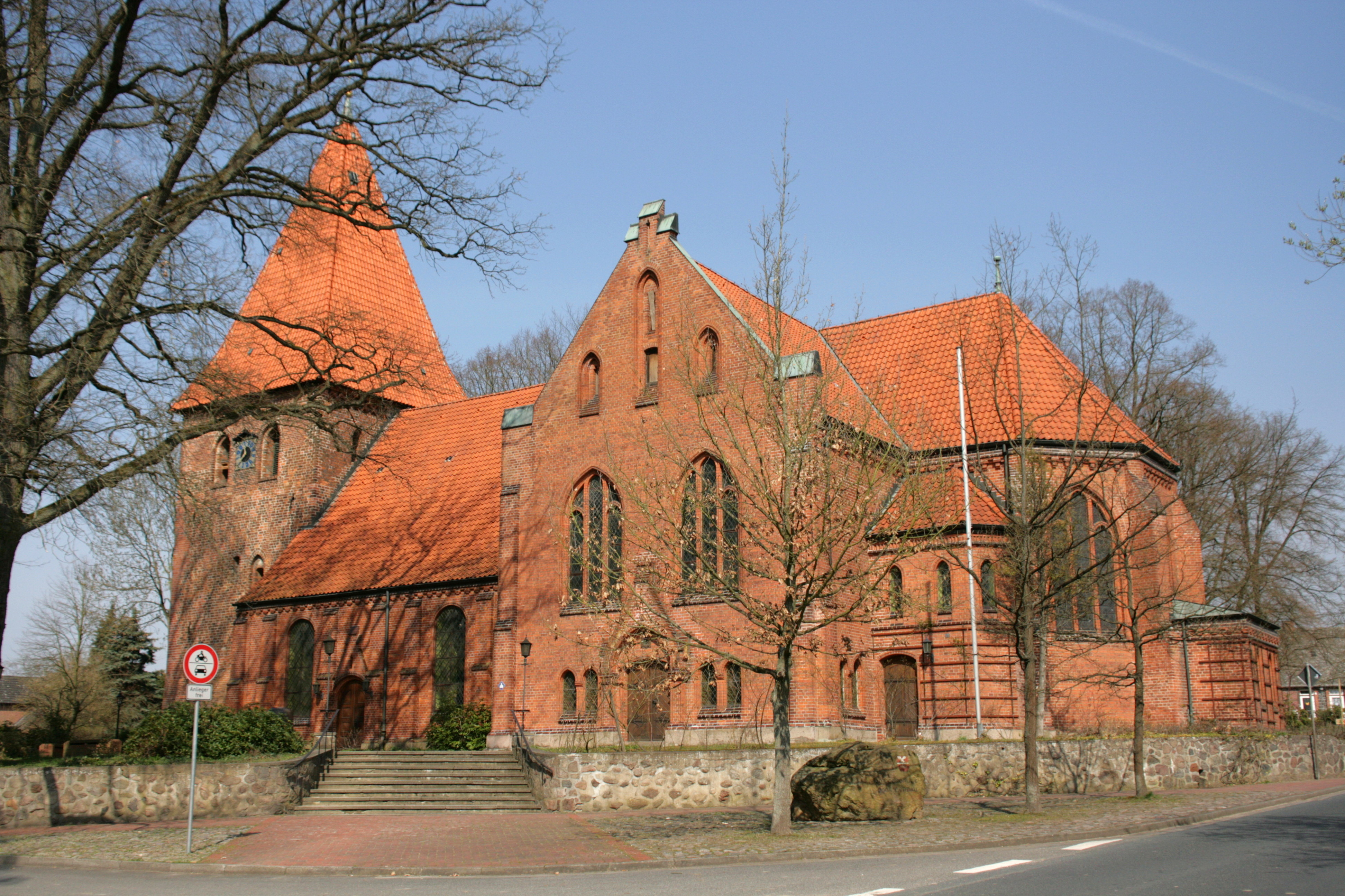 St. Michaelis an der Hauptstraße in Gerdau